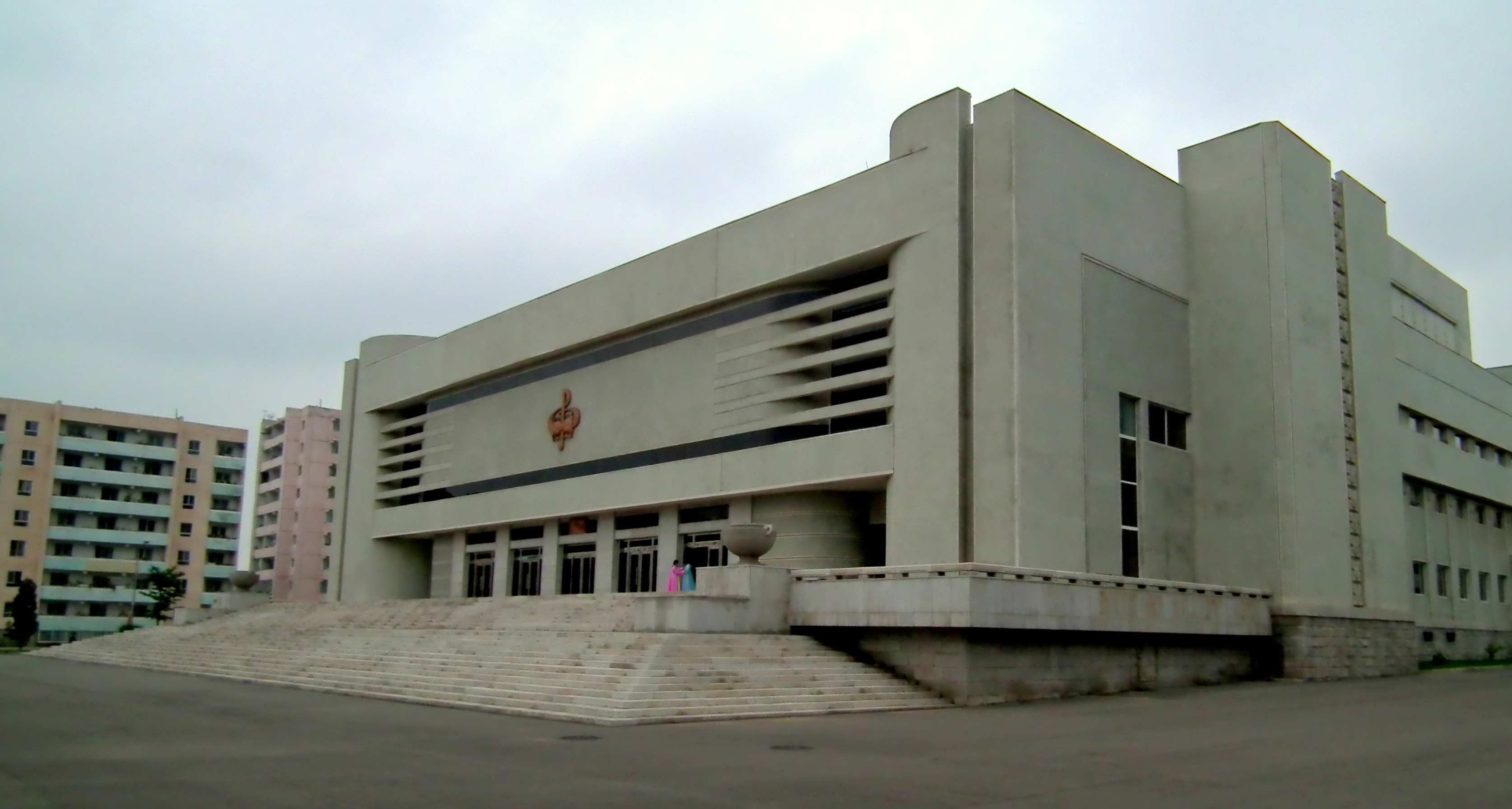 театр в Саривоне